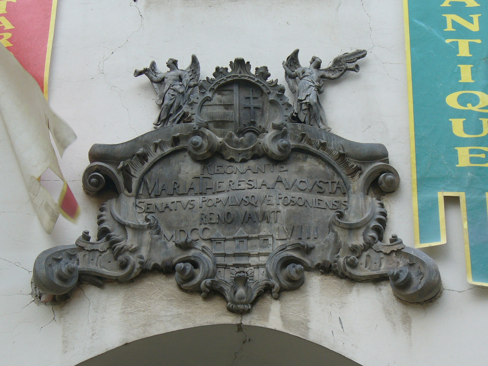 Pamiątkowa tablica na Bramie Michalskiej